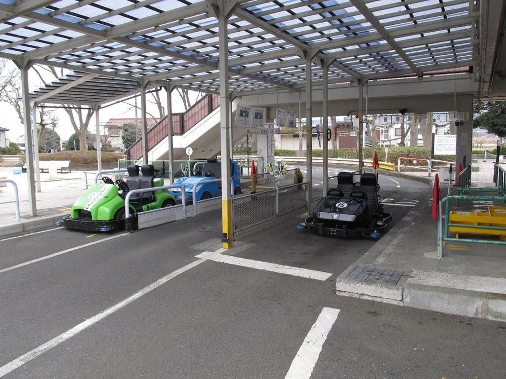 府中市郷土の森公園